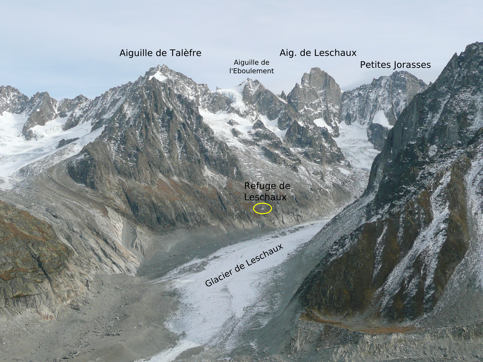 bassin de leschaux vu de l'envers des aiguilles